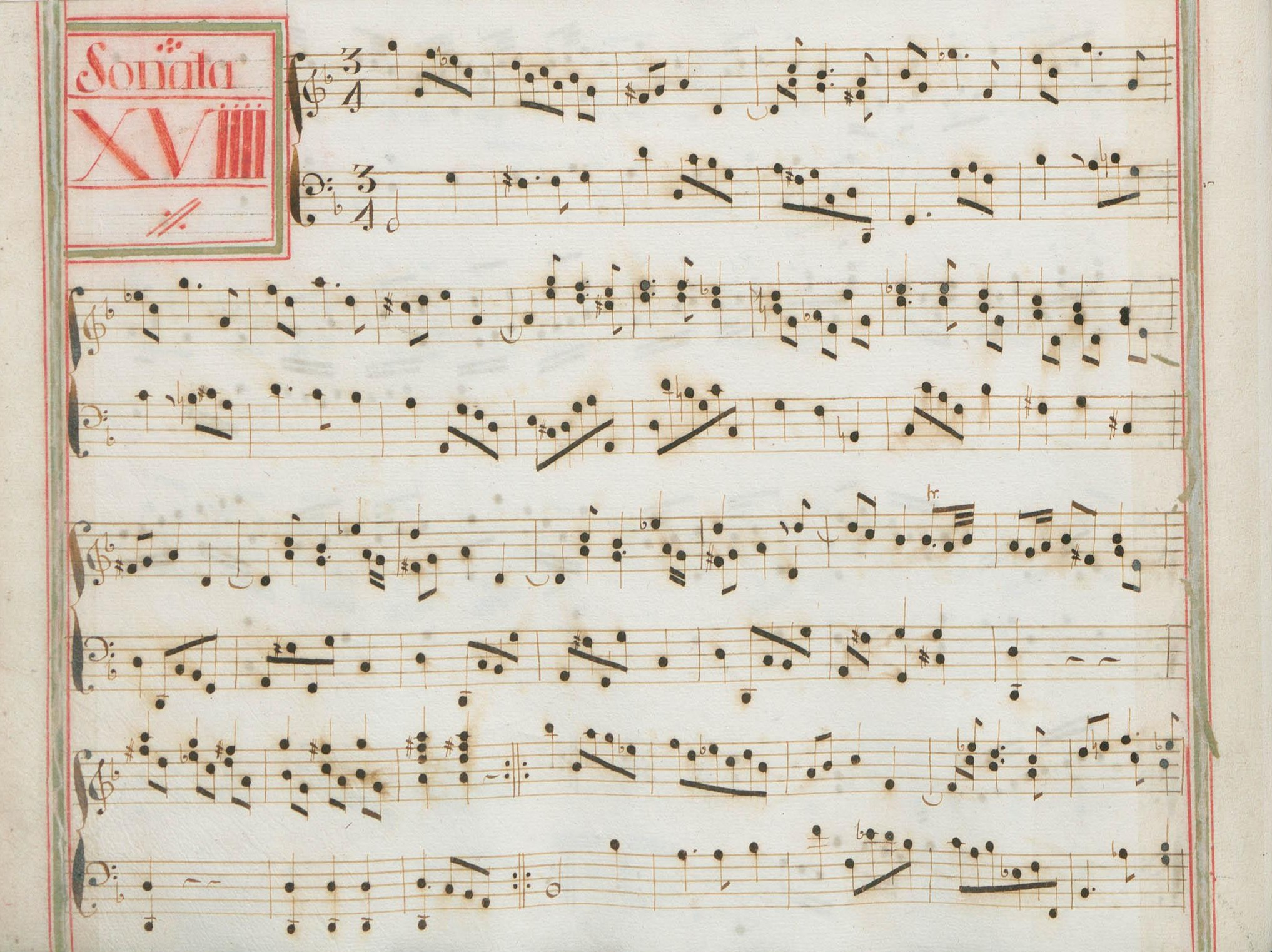 La sonate K. 60, telle qu'elle se présente dans le manuscrit de Venise, volume XIV no. 19.